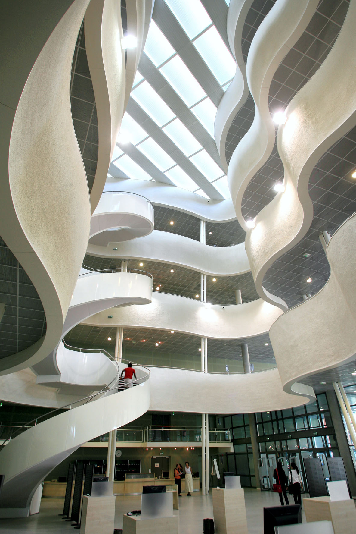 Bibliothèque universitaire du Havre